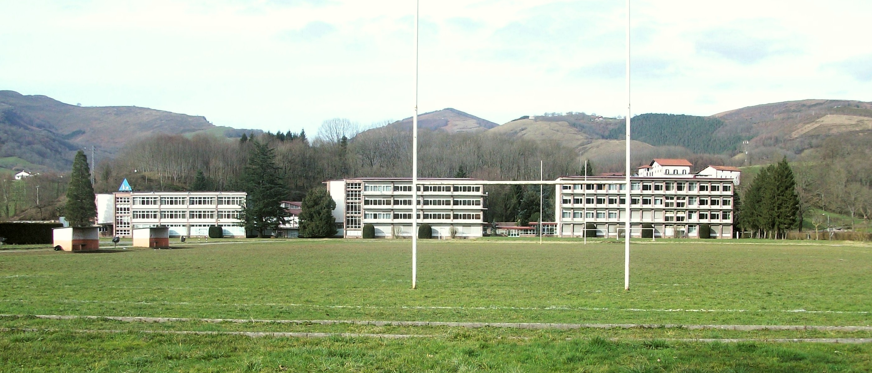 Baztango Lekarozko Ikastetxea. Nafarroa, Euskal Herria.